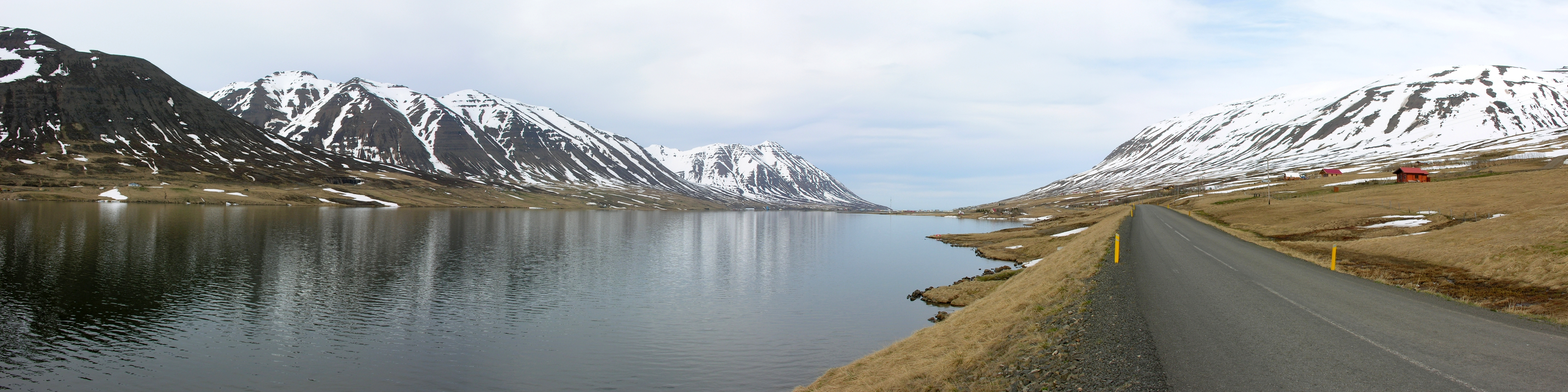 Ólafsfjörður